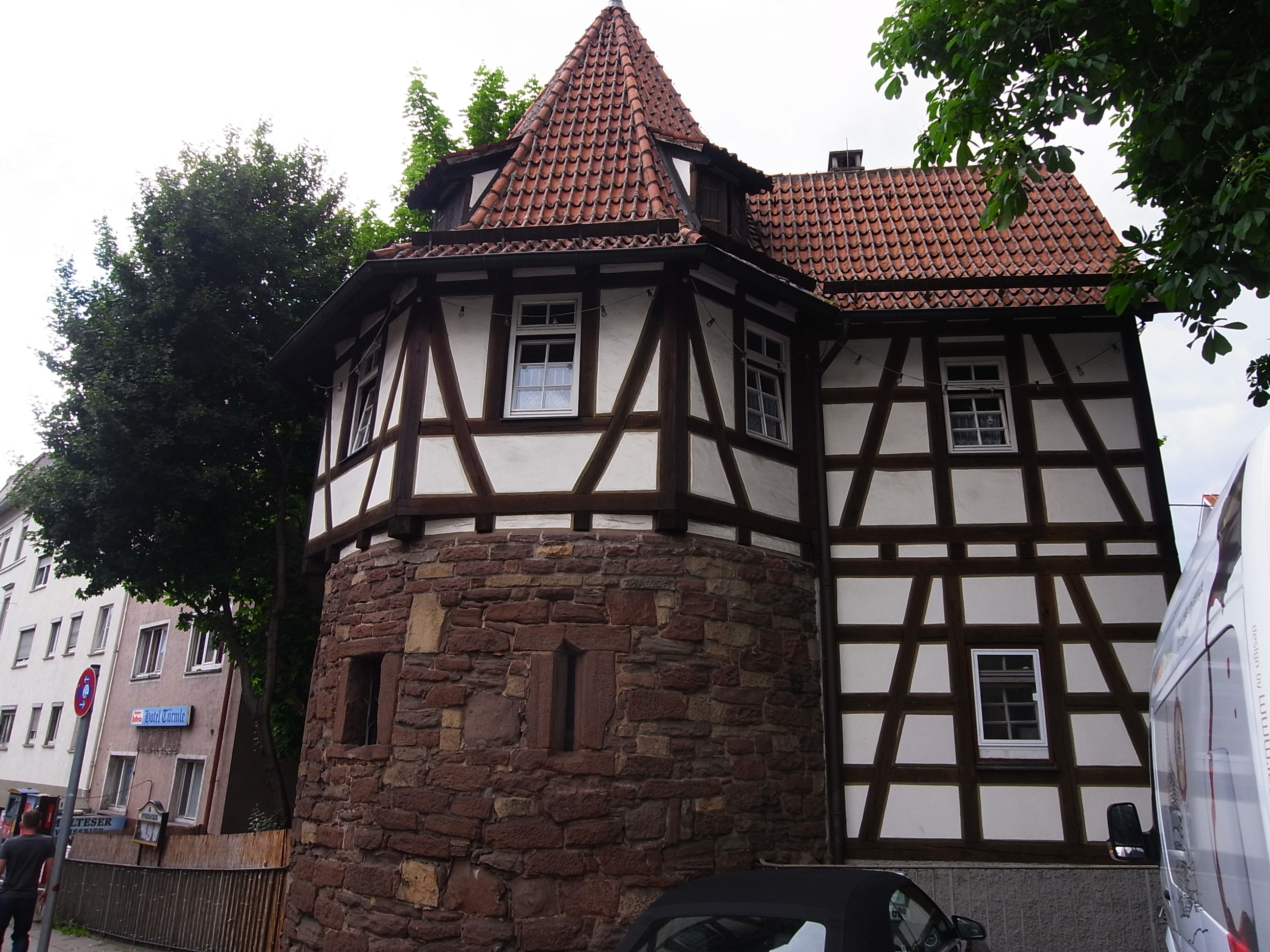 Der einstige Kastkellereiturm, heute Schellenturm (Stuttgart)